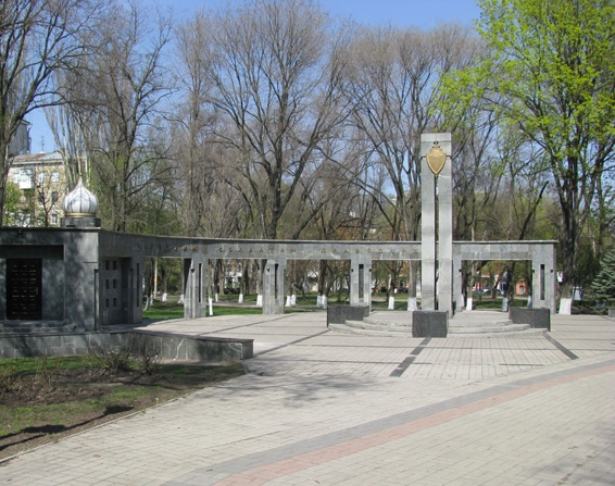 Мемориал погибшим солдатам правопорядка